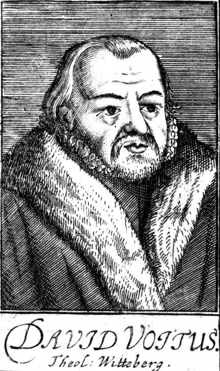 Kupferstich David Voit, (1530-1589), deutscher evangelischer Theologe